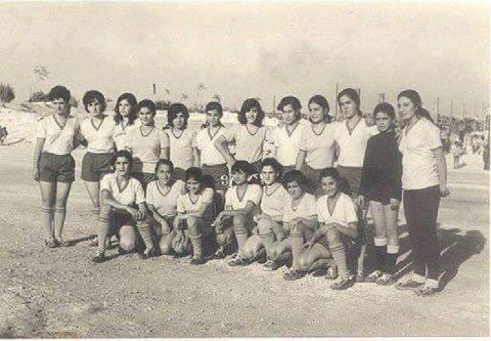 أول فريق كرة قدم نسائي في الوطن العربي في حلب حوالي 1950 - سوريا.